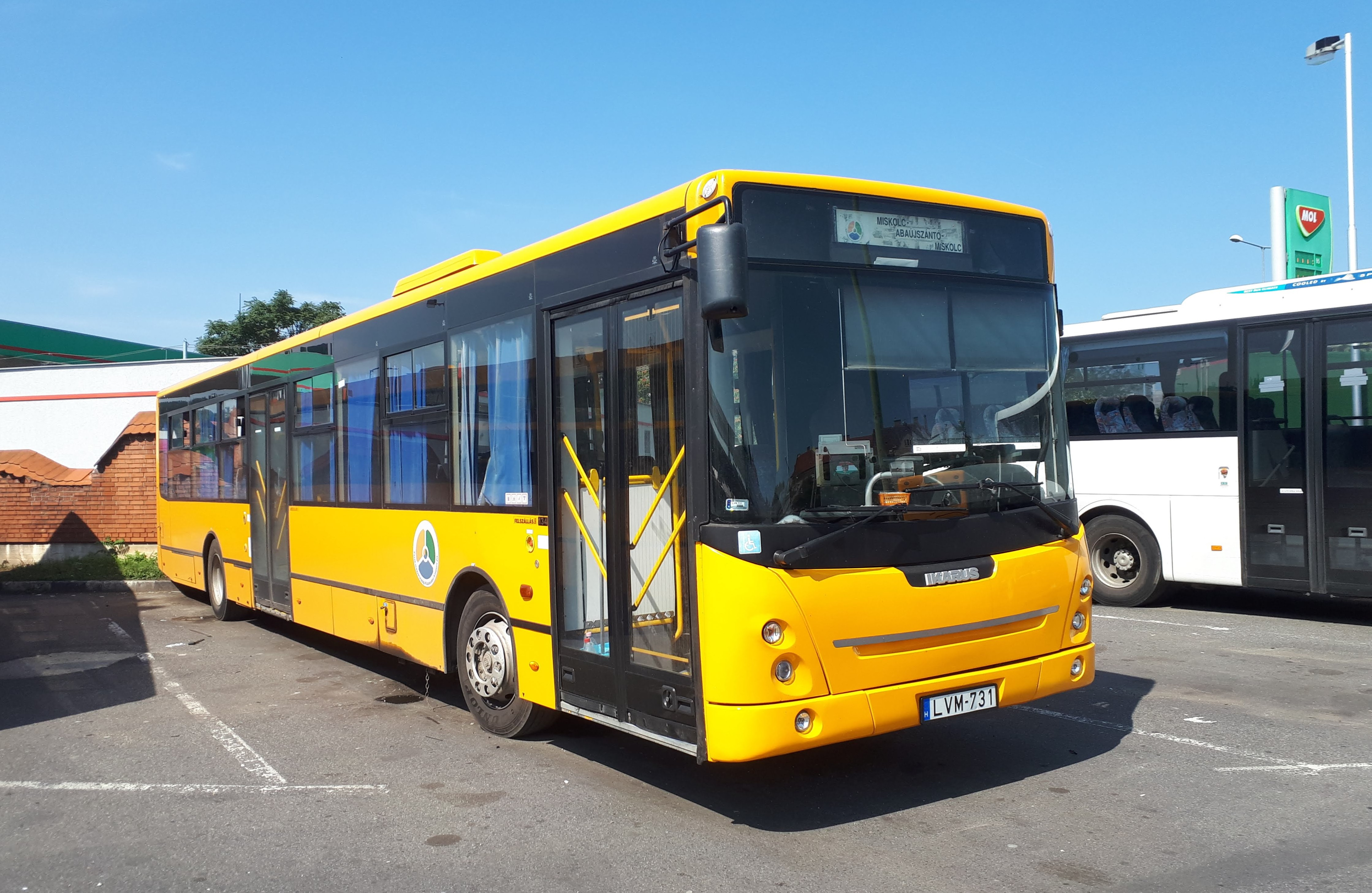 Az ÉMKK LVM-731 rendszámú Ikarus-ARC E134 típusú busza Miskolcon, a 3729-es helyközi járaton.